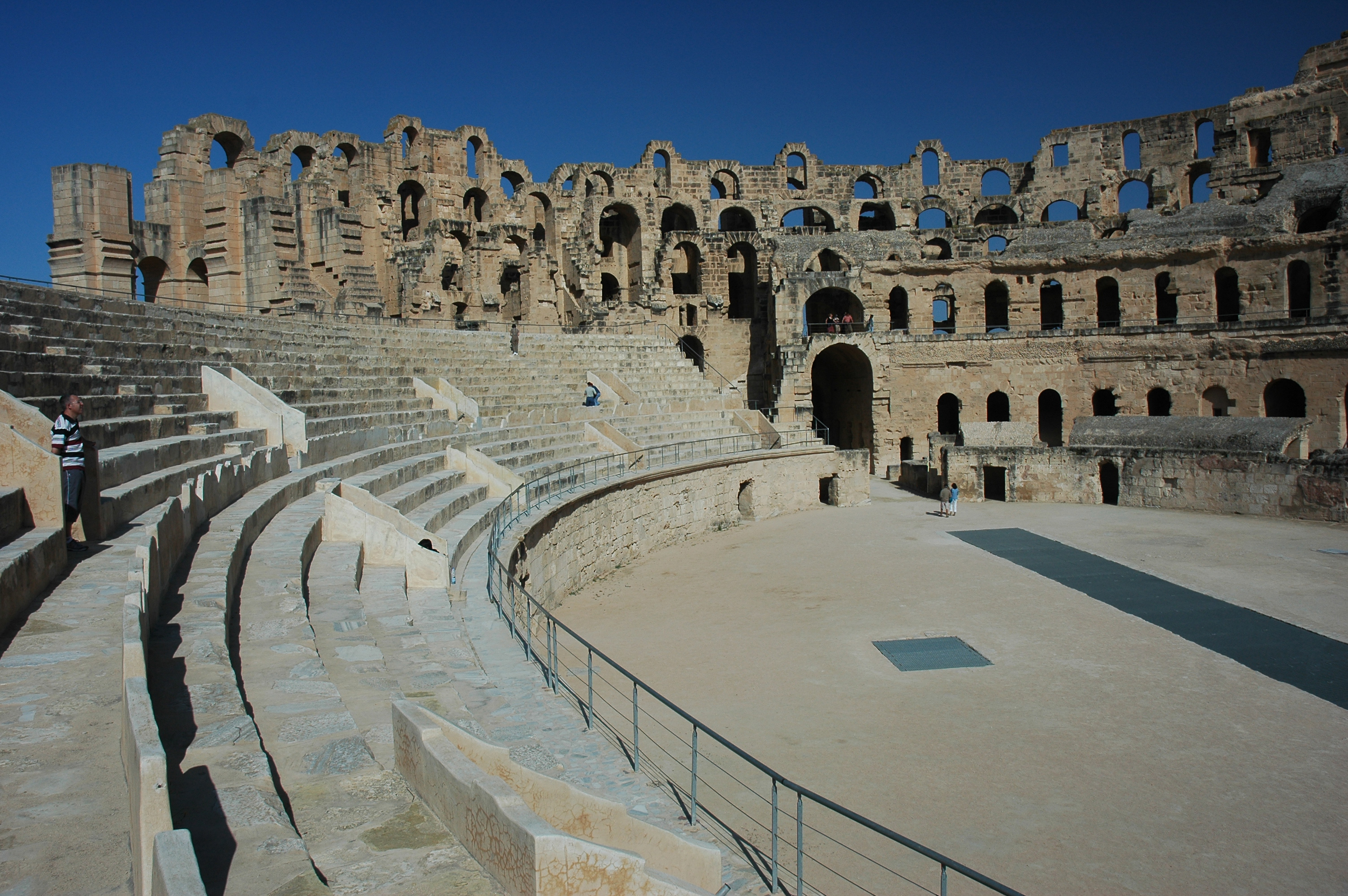 Amphithéatre d'EL'DJEM en Tunisie